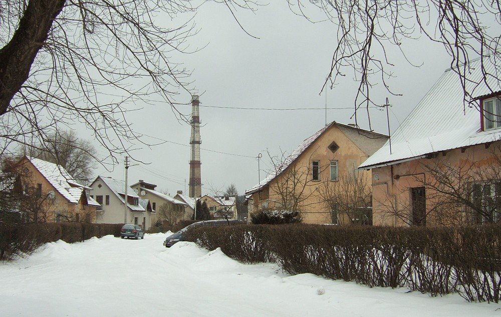 Grigiškės